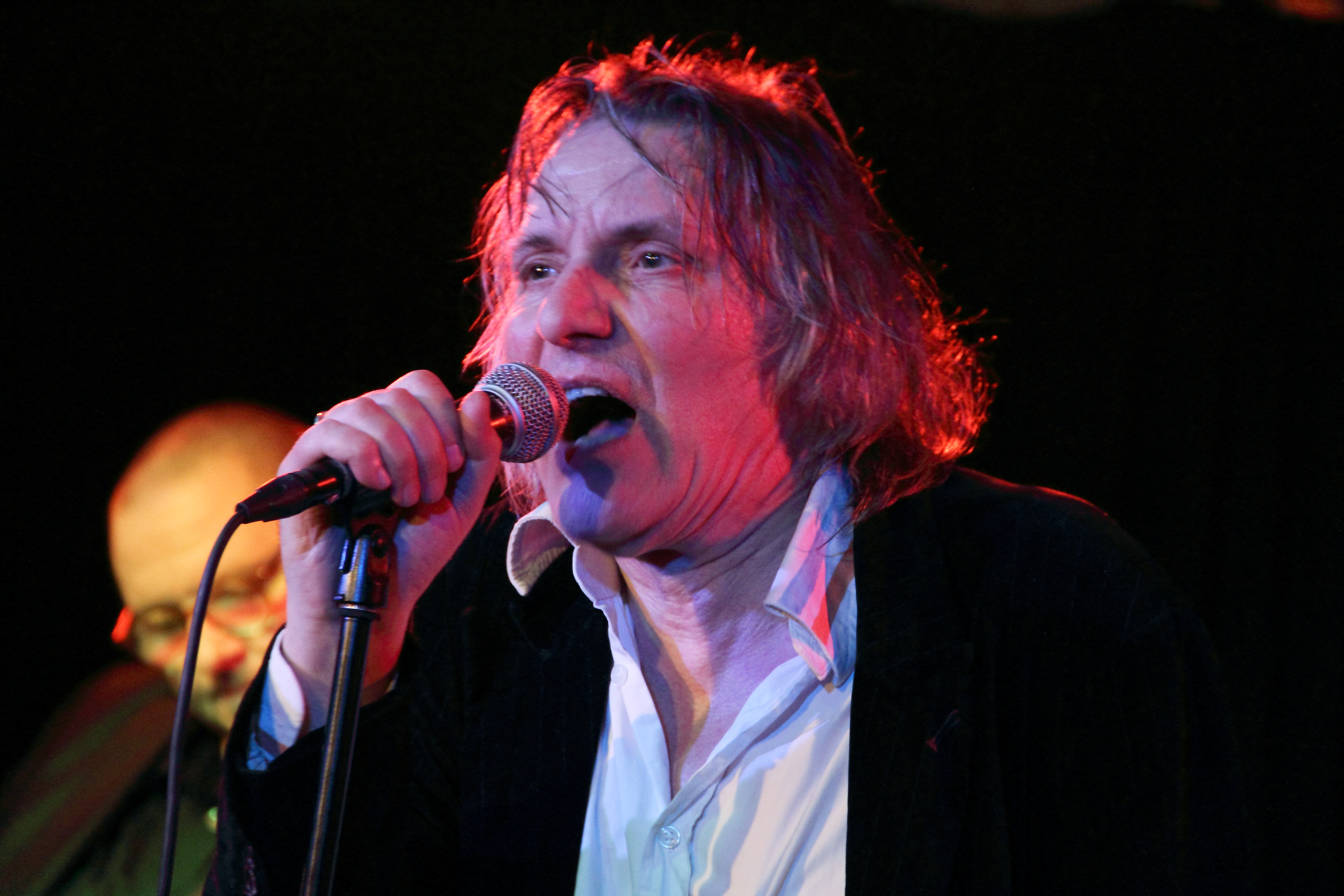 Die Soul-Punk-Band Family 5 um Peter Hein und Xao Seffcheque beim Auftritt im Club W71, Weikersheim.